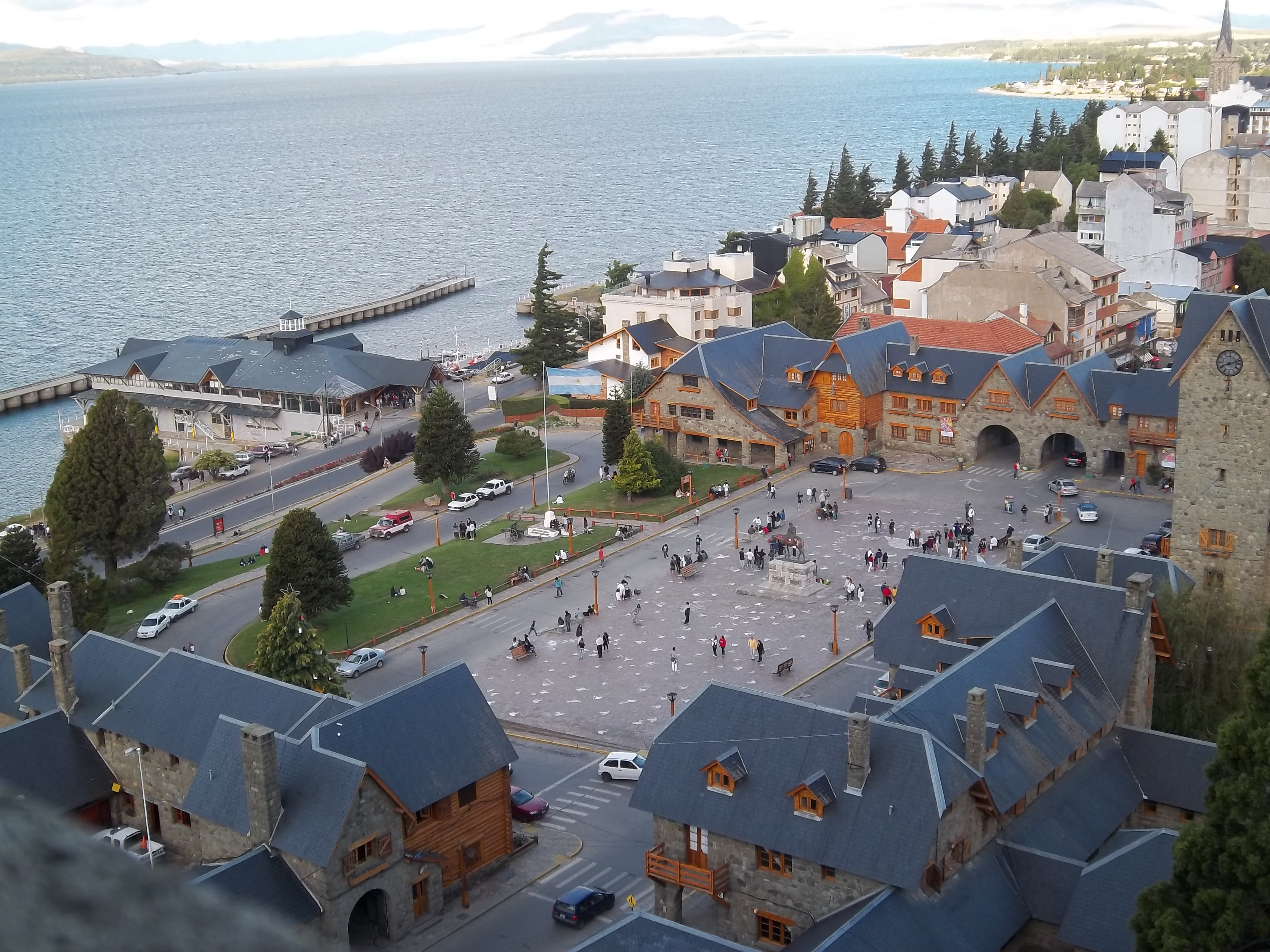 Centro Cívico y Puerto San Carlos junto al lago Nahuel Huapi en San Carlos de Bariloche, departamento Bariloche, provincia de Río Negro, Argentina.